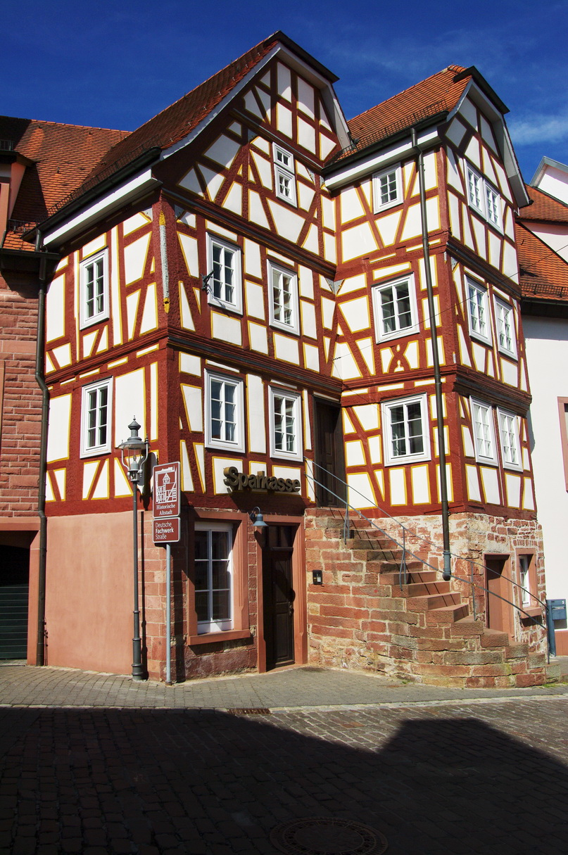 Sparkasse Walldüen